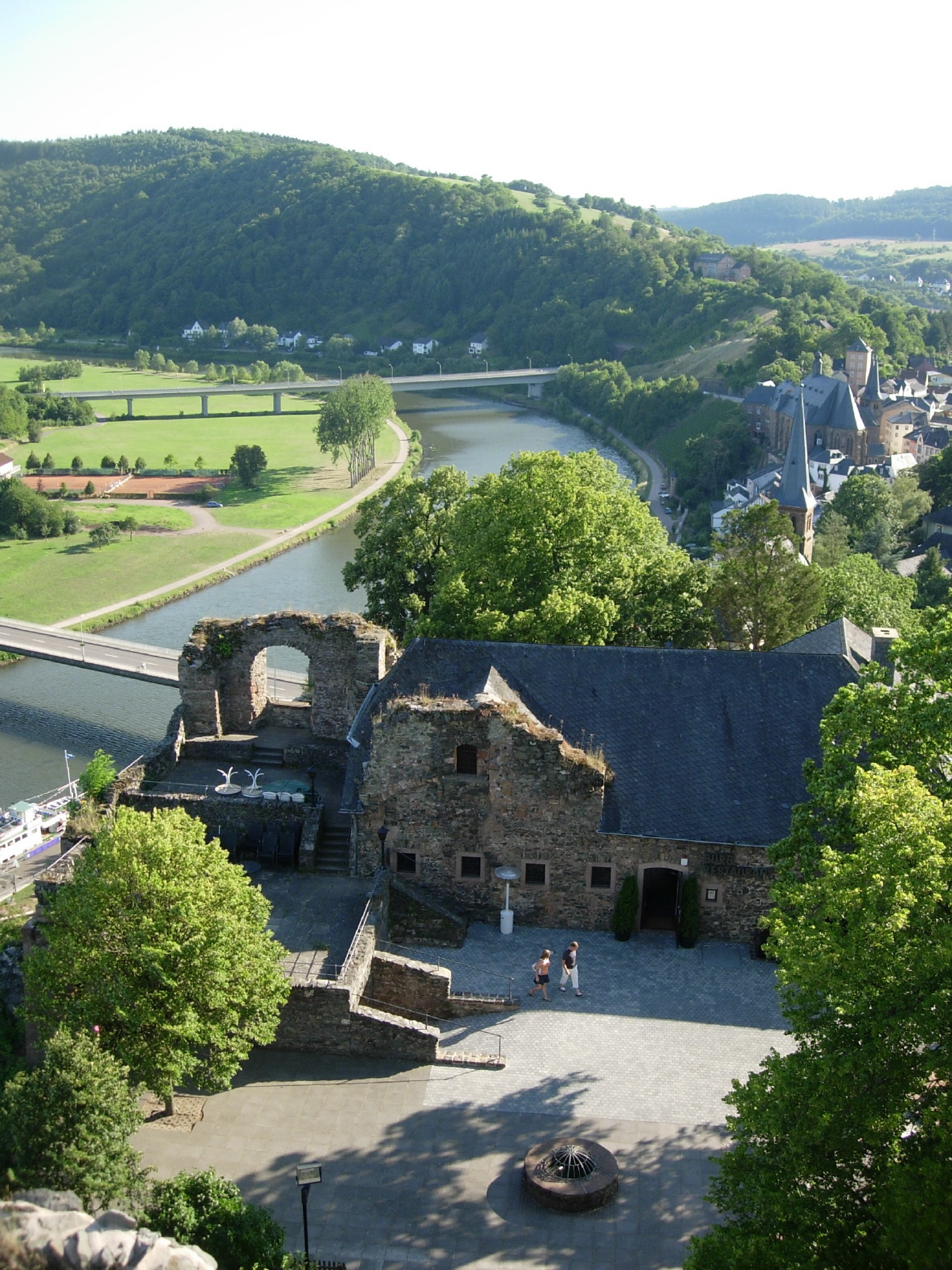 Die Saar, von der Saarburg in Saarburg aus gesehen. Blickrichtung Süden.